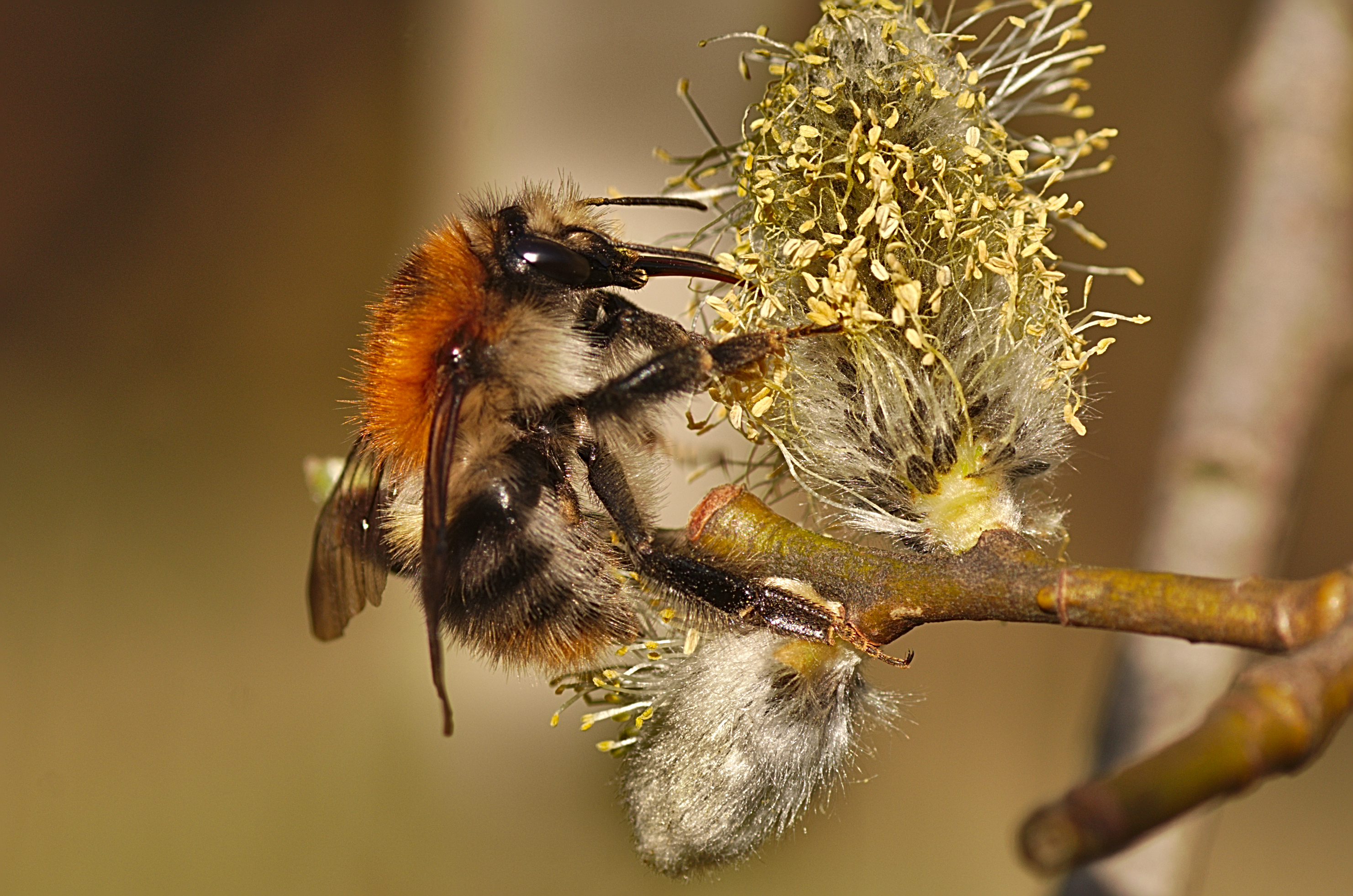 Nektarsammelnde Biene an einem Blütenkätzchen